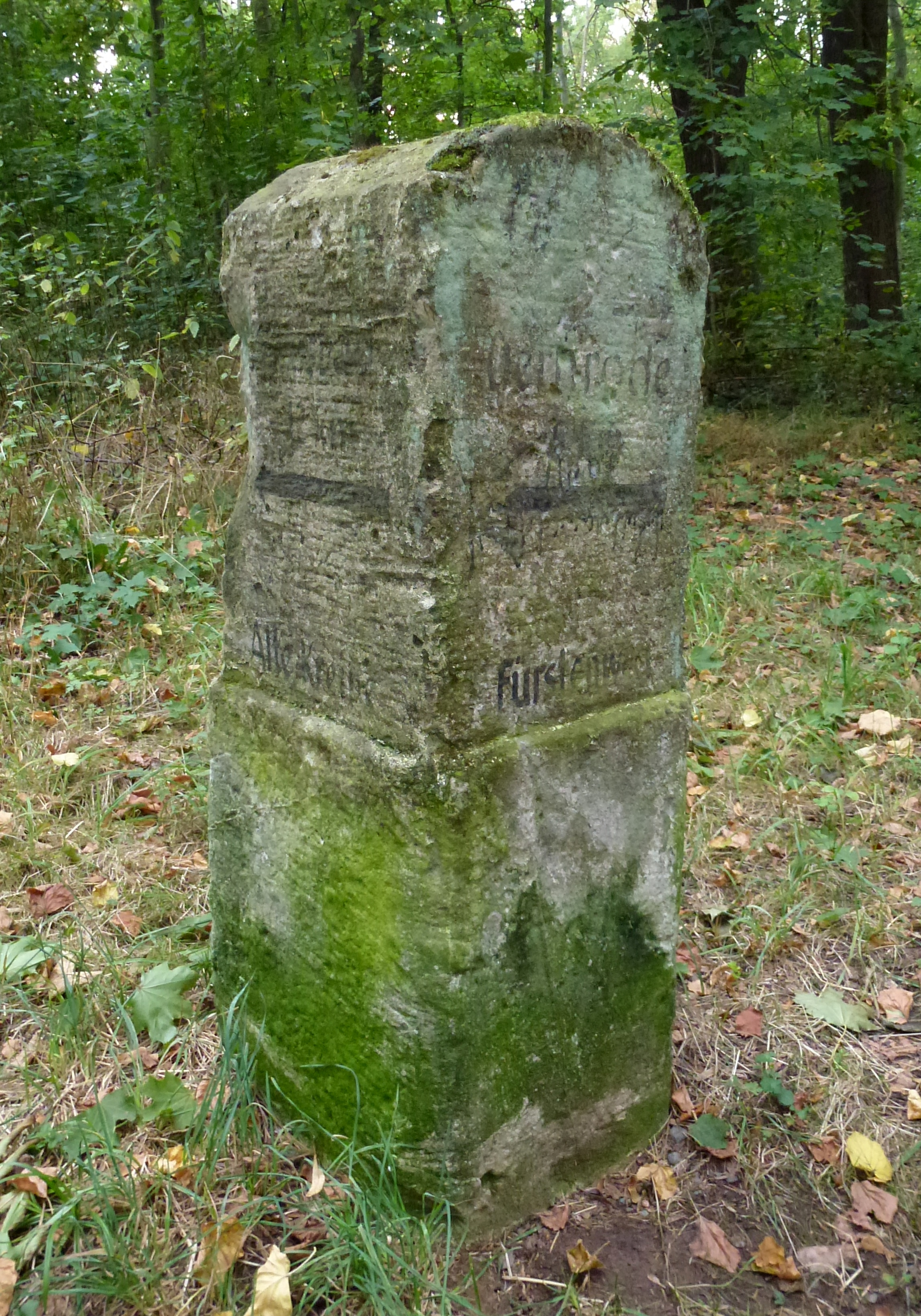 Denkmalgeschützter steinerner Wegweiser am Westausgang des Schlossparks Ballenstedt.